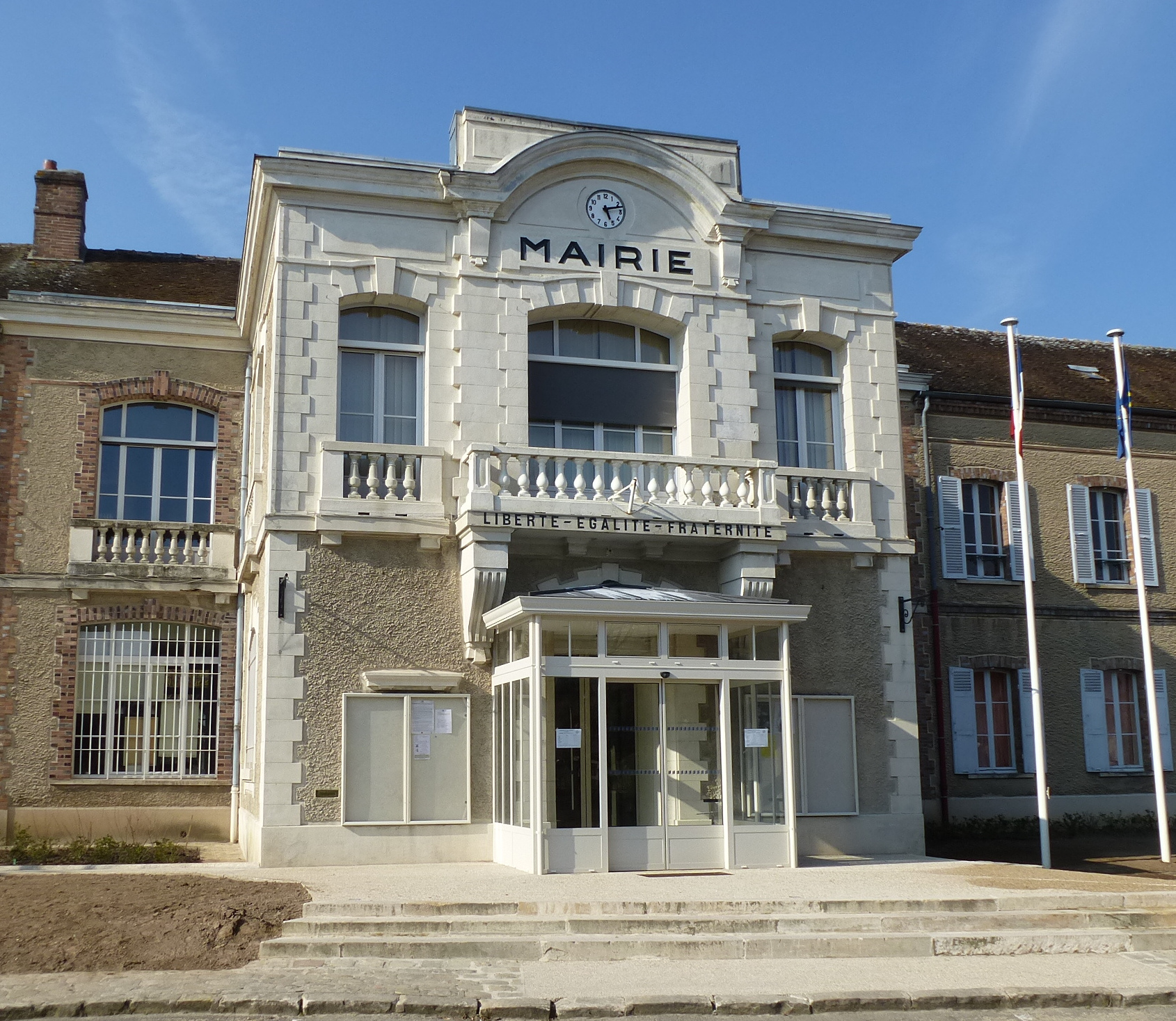 Mairie de Bourron-Marlotte. (département de la Seine et Marne, région Île-de-France).